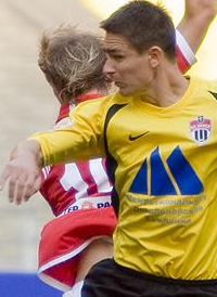 Andrei Stepanov, Estonian footballer.